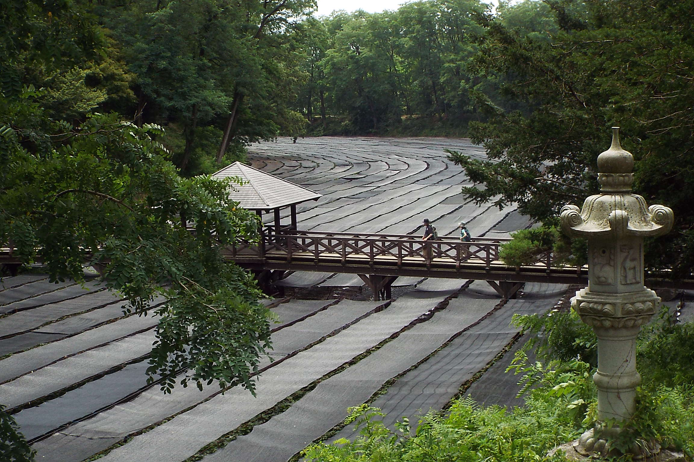 2016-07-03 Daio Wasabi Farm 大王わさび農園